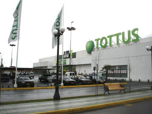 Supermercado de la ciudad de Puente Alto